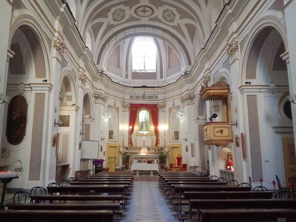 Chiesa di Santa Maria della Concordia (Napoli, interno)